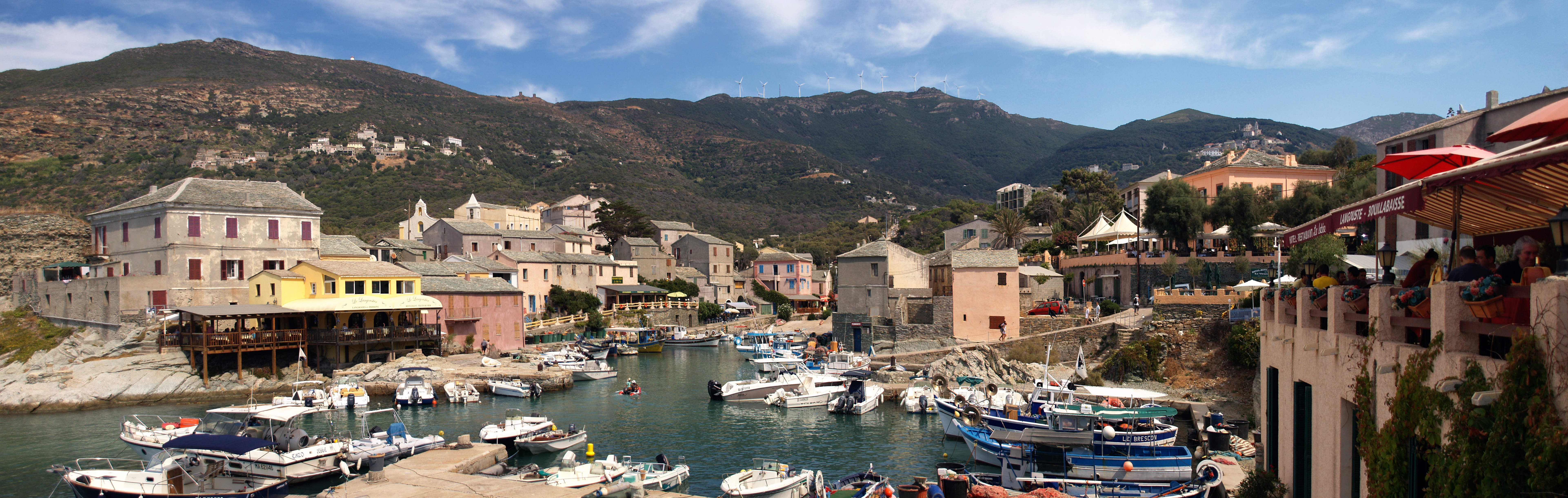 Centuri (Corsica) - Vue d'ensemble de Centuri depuis le port